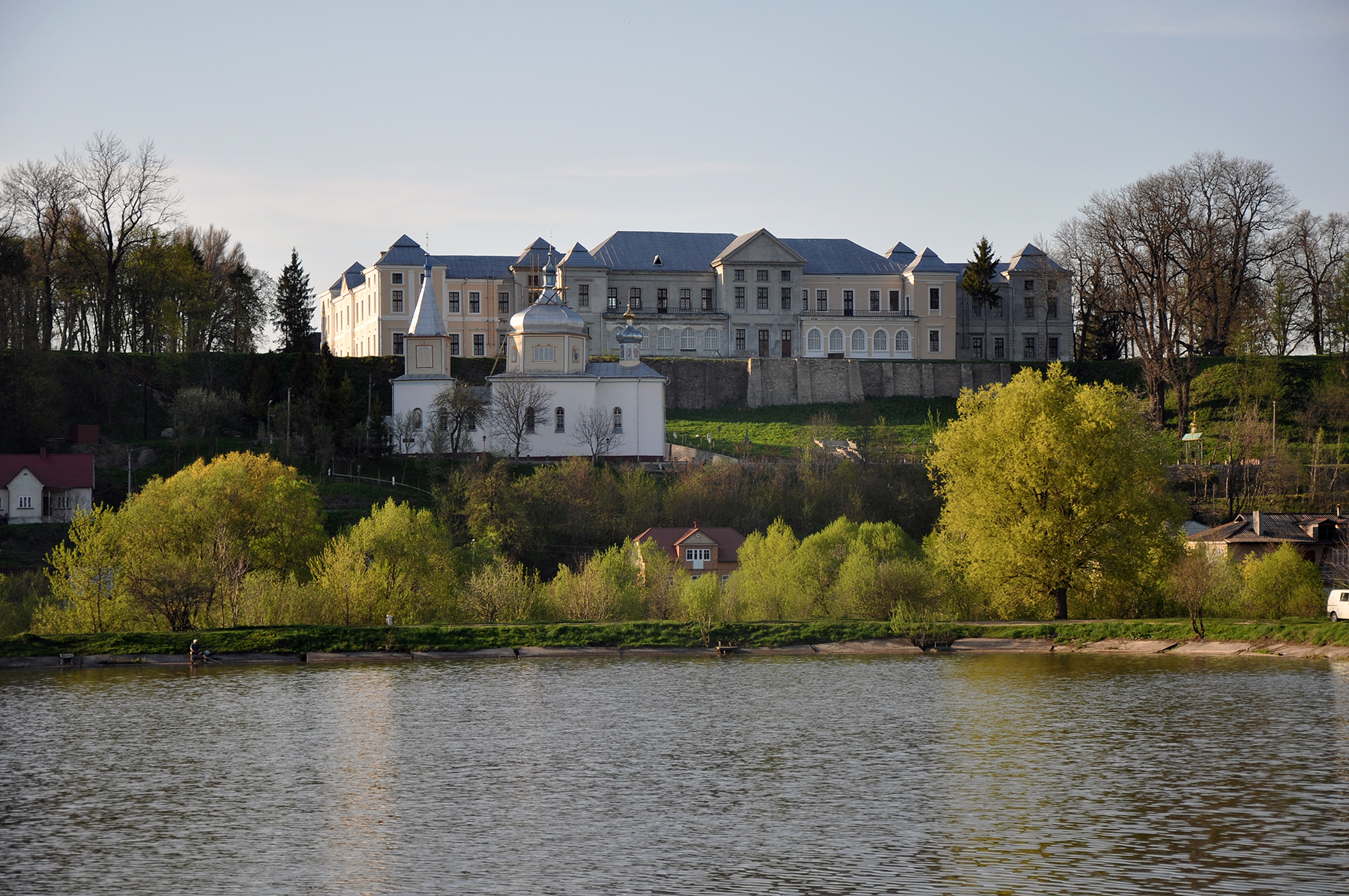 Церква Вознесіння Господнього і Палацовий комплекс, Вишнівець